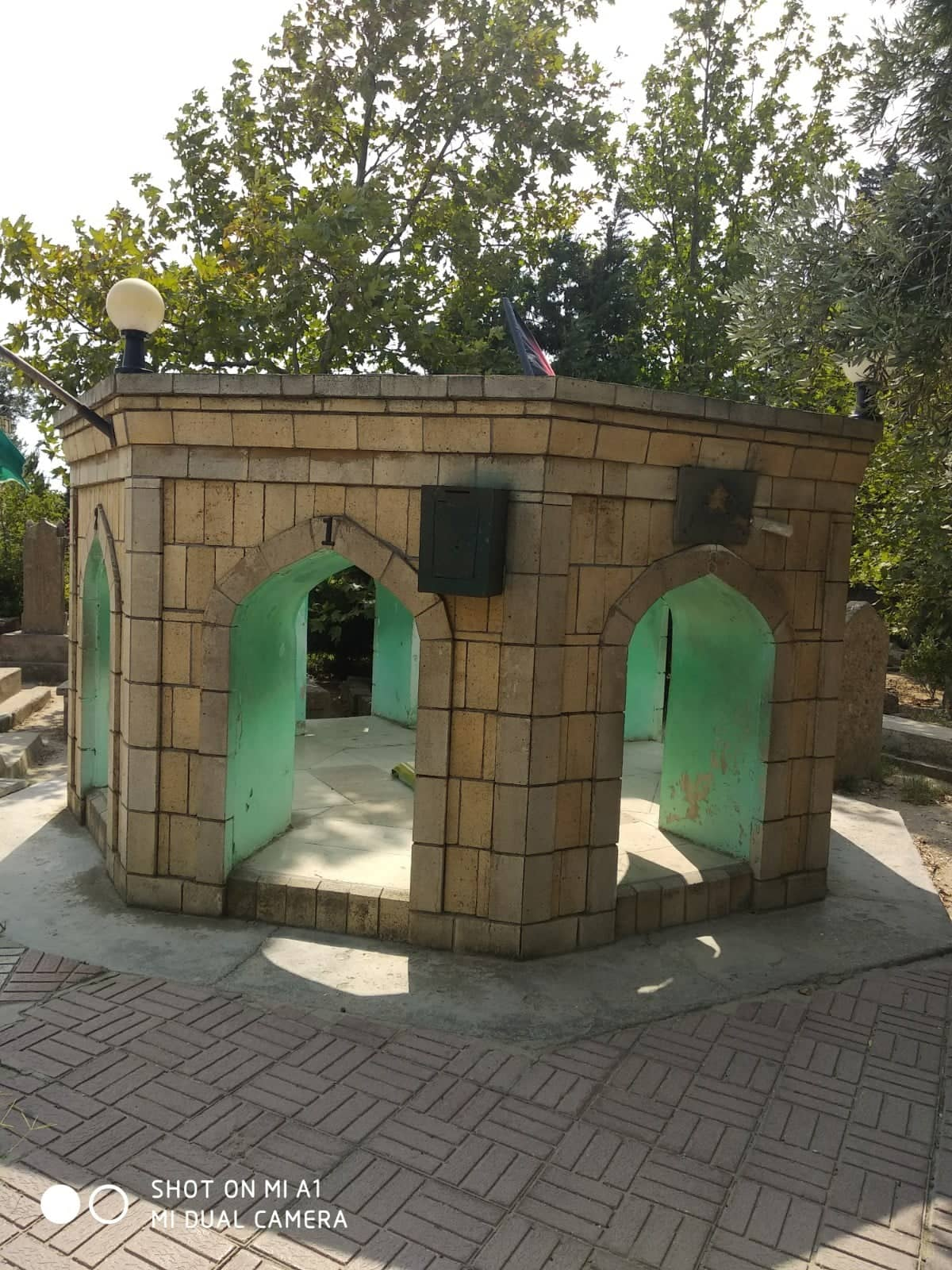 Maştağa Yeddi qapı türbəsi